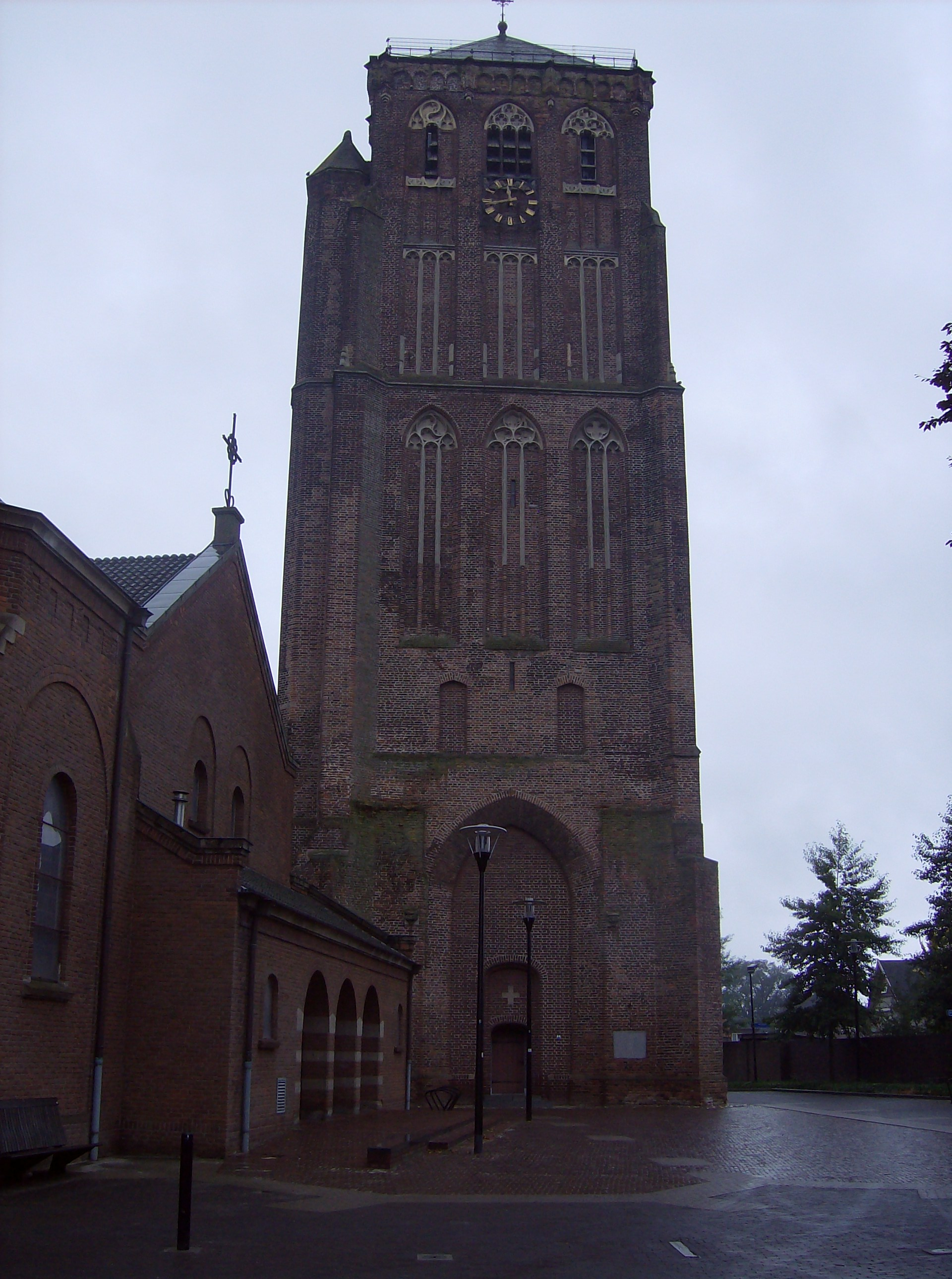 Toren Grotestraat 63 Sambeek